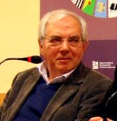 D'esquerra a dreta, Aureli Argemí (CIEMEN), Andreu Felip (ACCD) i Quim Arrufat (CIEMEN).